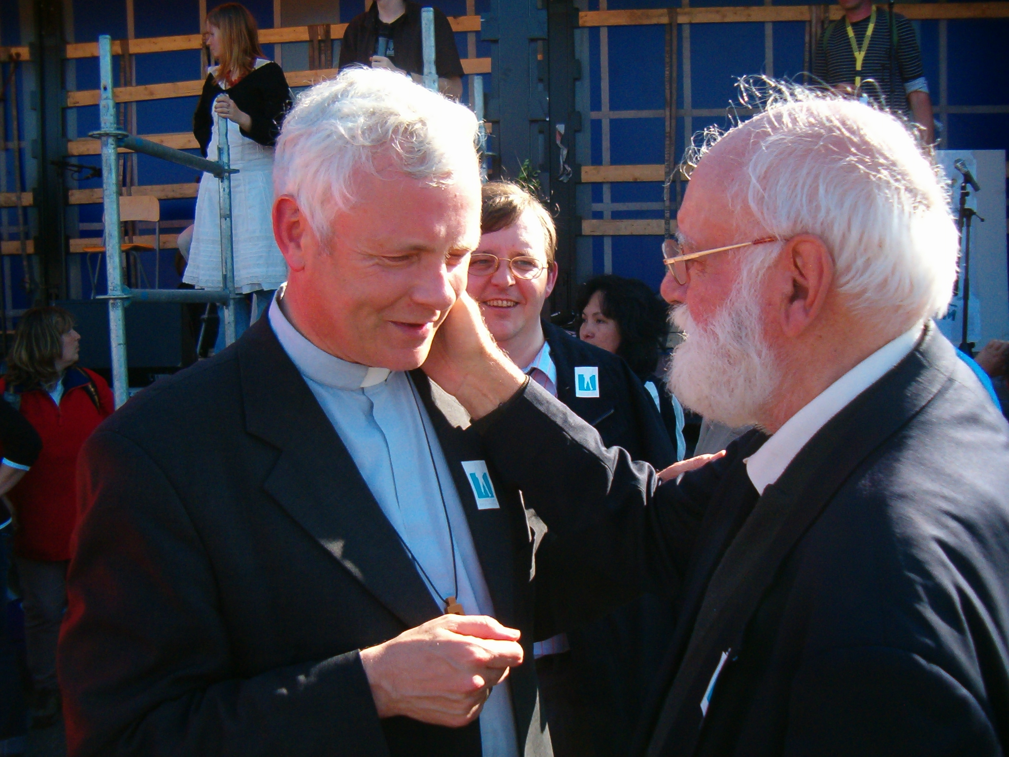 Banneux, Jef Ulburghs met Patrick Hoogmartens